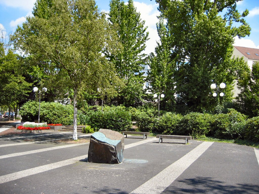 Wilhelmshaven, Synagogenplatz an der Börsenstr./Ecke Parkstr.